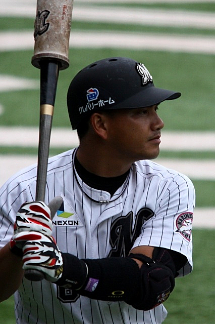 日本プロ野球 千葉ロッテマリーンズ 井口資仁 内野手